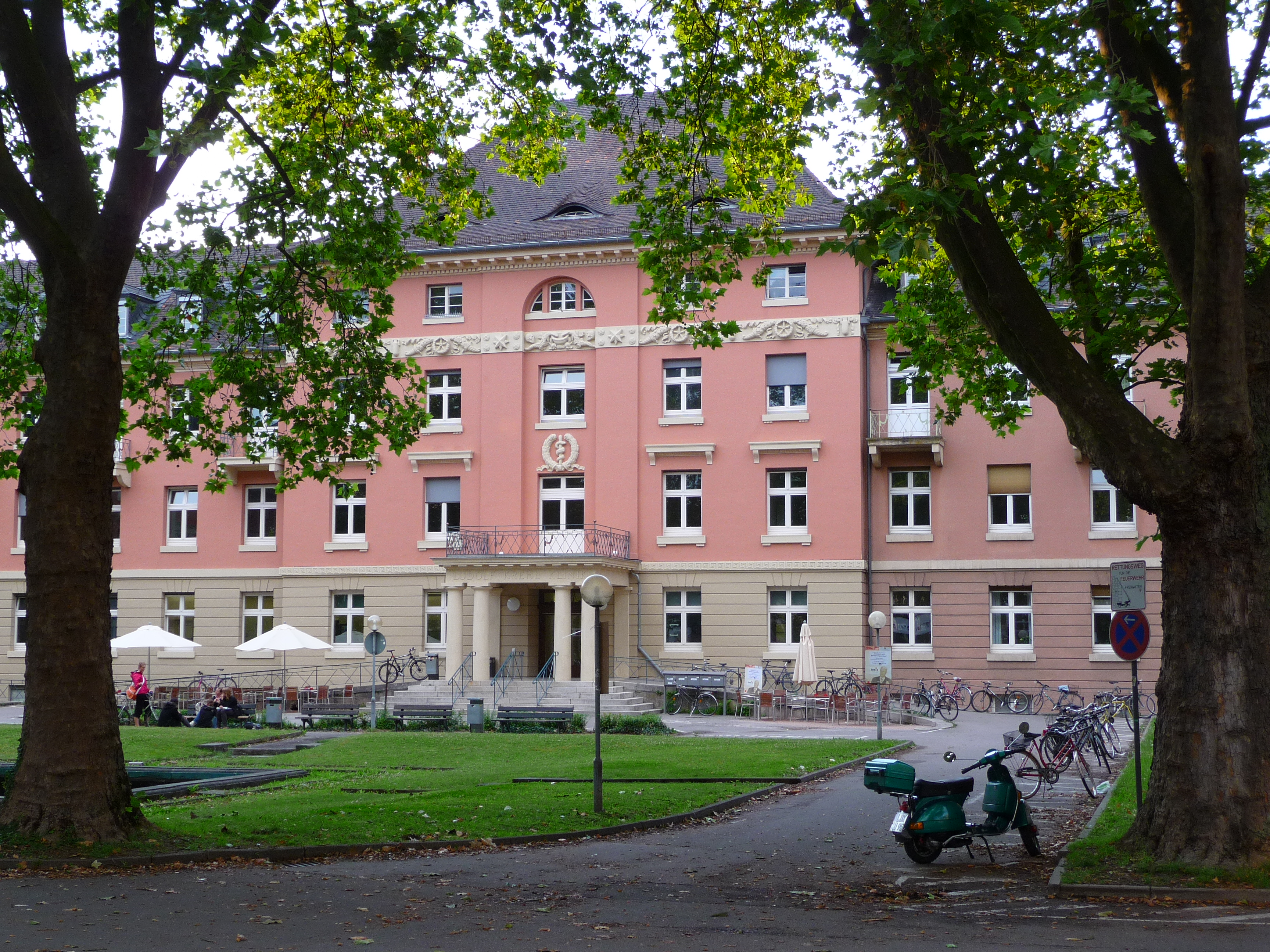 Haupteingang der früheren Ludolf-Krehl-Klinik in der Bergheimer Straße in Heidelberg (Baden-Württemberg, Deutschland)